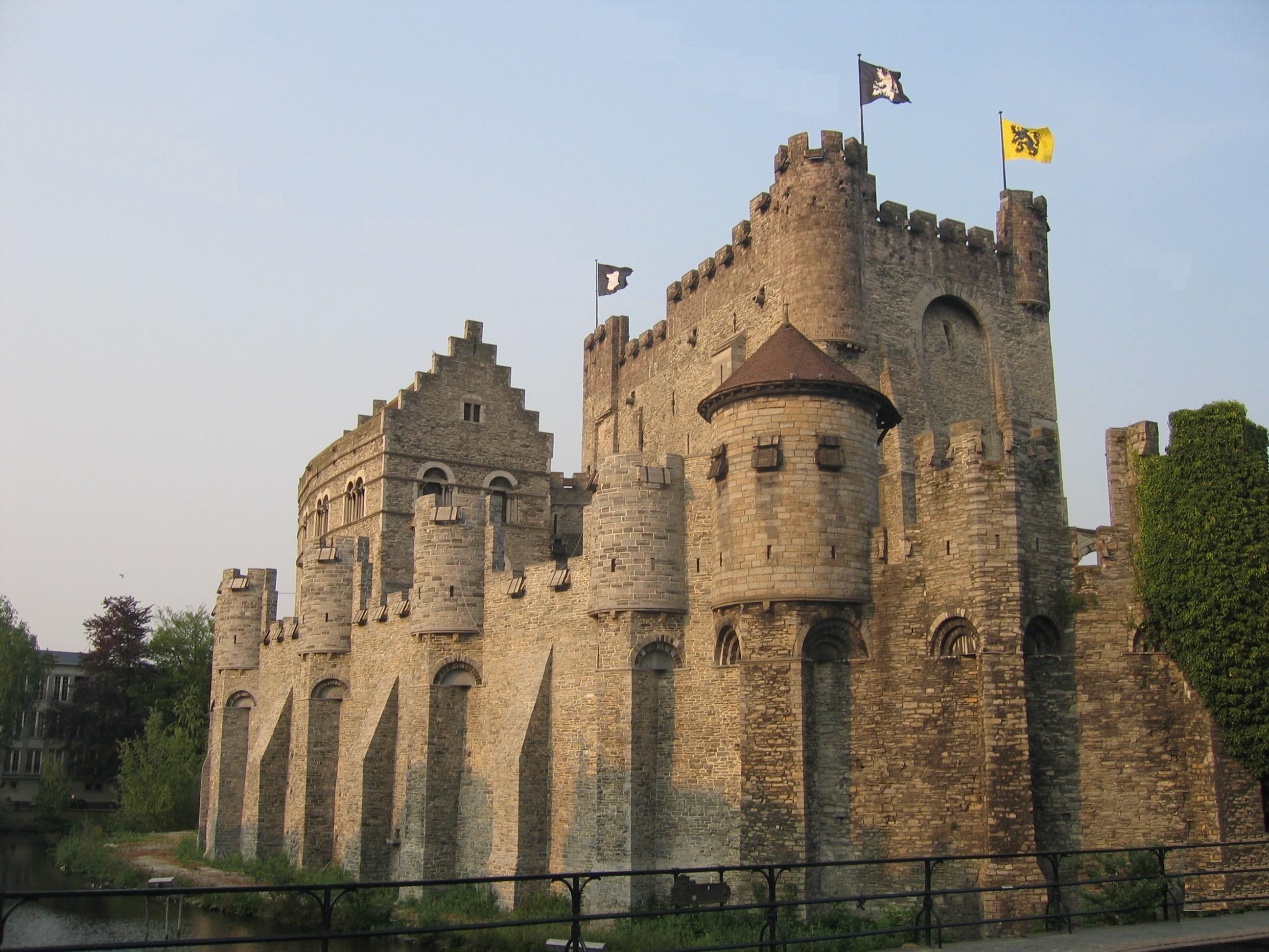 Gravensteen